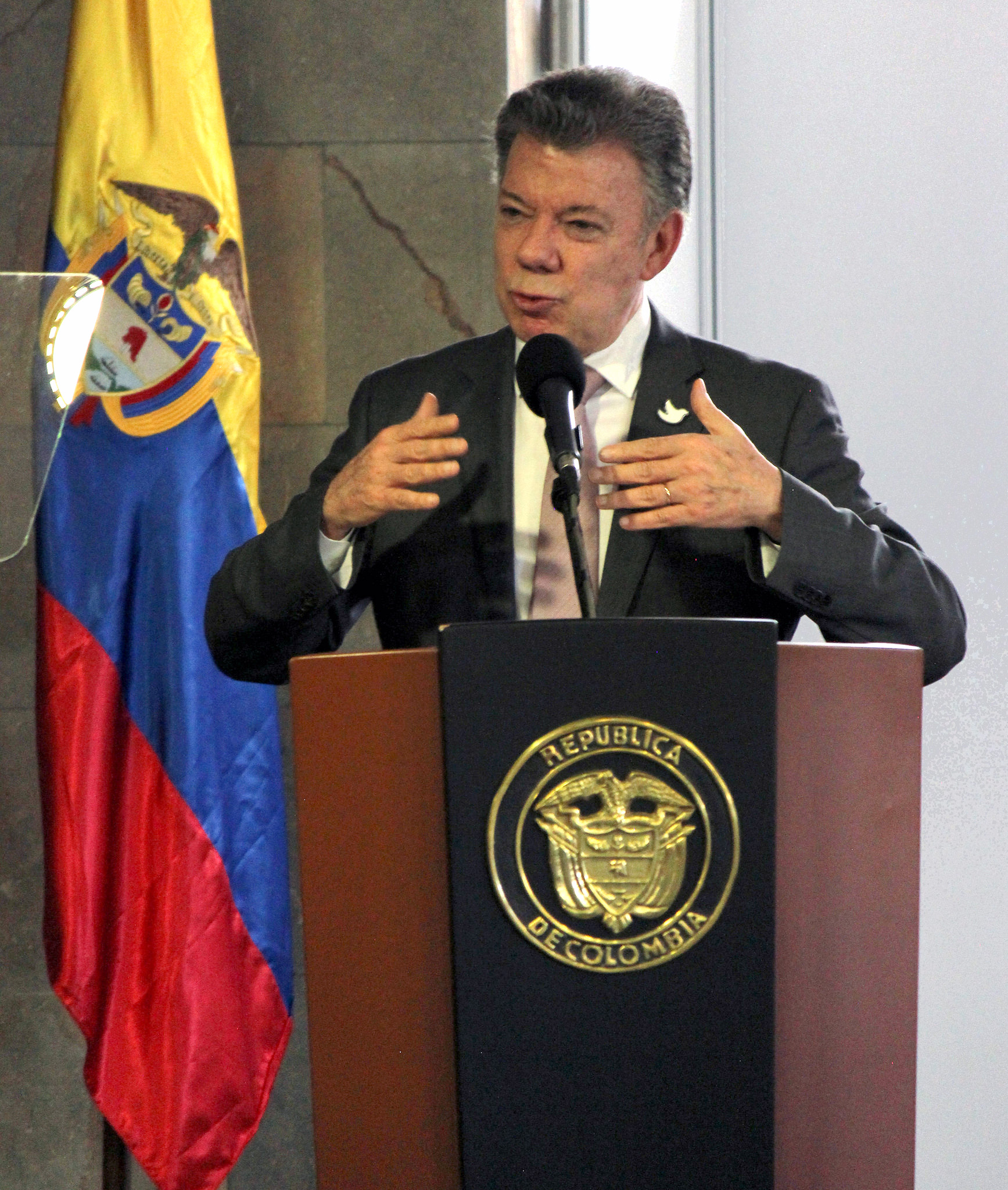 El presidente Juan Manuel Santos durante la inauguración de Colombiamoda, el 26 de julio del 2016, en Medellín, Colombia.